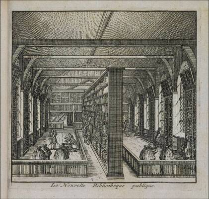 Universiteitsbibliotheek Leiden in 1694. La nouvelle bibliothèque, from Les delices de Leide, une des célèbres villes de l'Europe, Leiden: P. van der Aa, 1712.